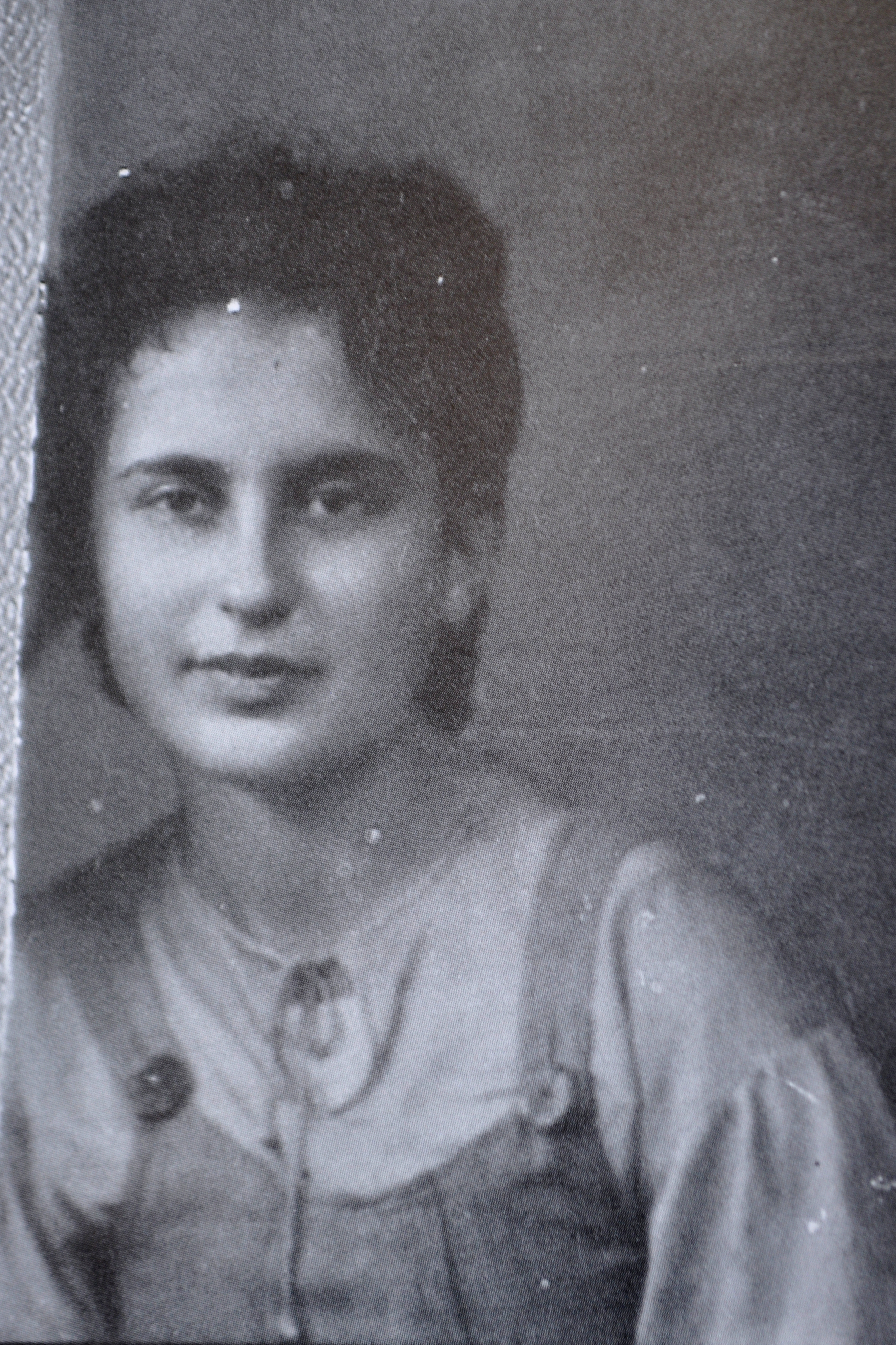 Eva, hija de Sabina Spielrein